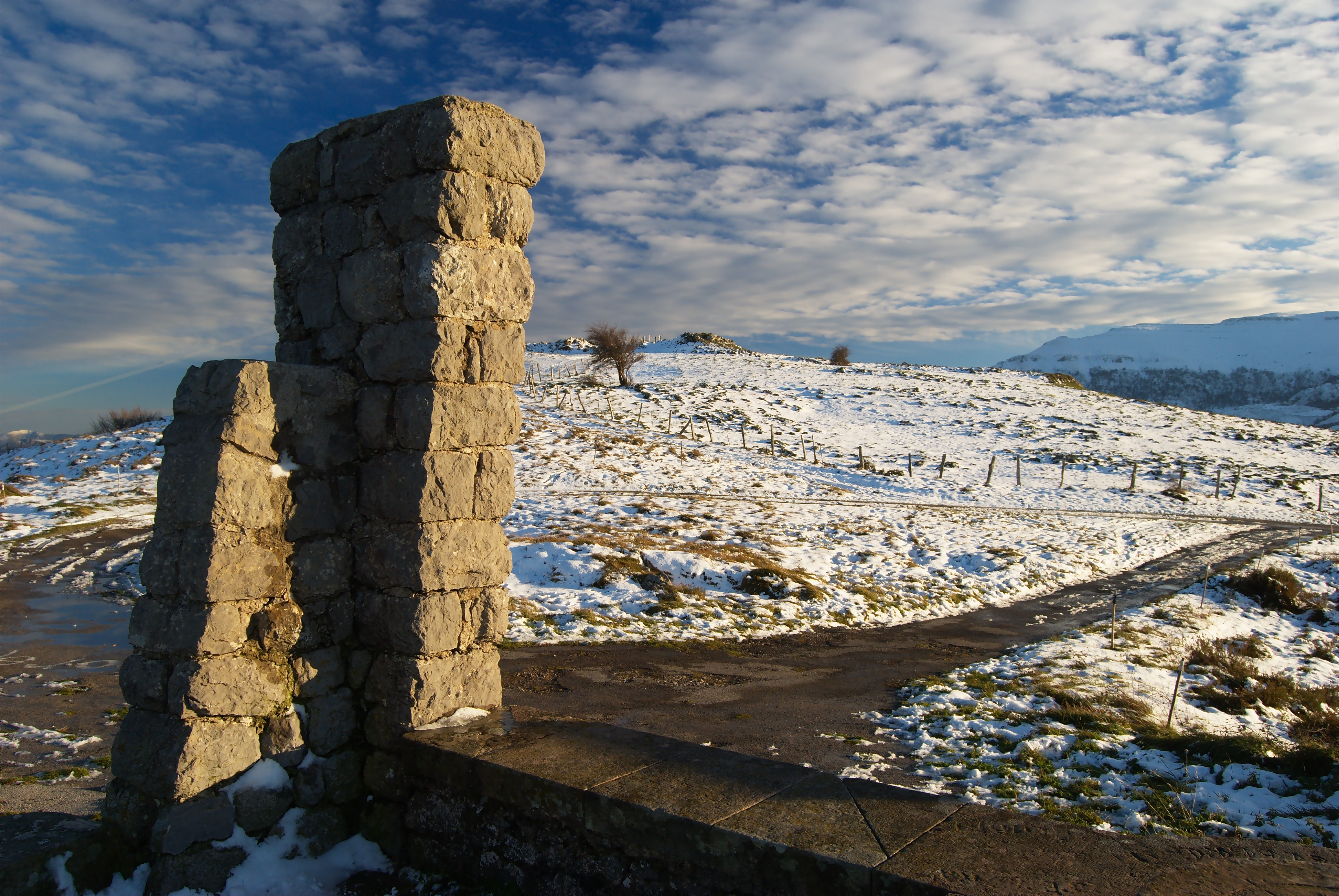 Montaña oriental This is a photography of a Special Area of Conservation in Spain with the ID: ES1300002. Natura2000 entry, EEA entry